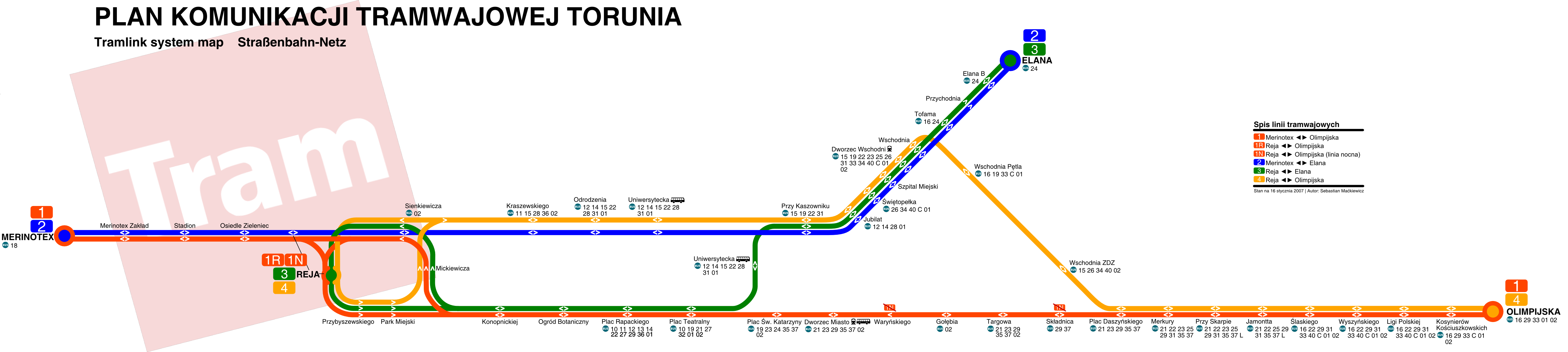 Sieć komunikacji tramwajowej Torunia (2007).